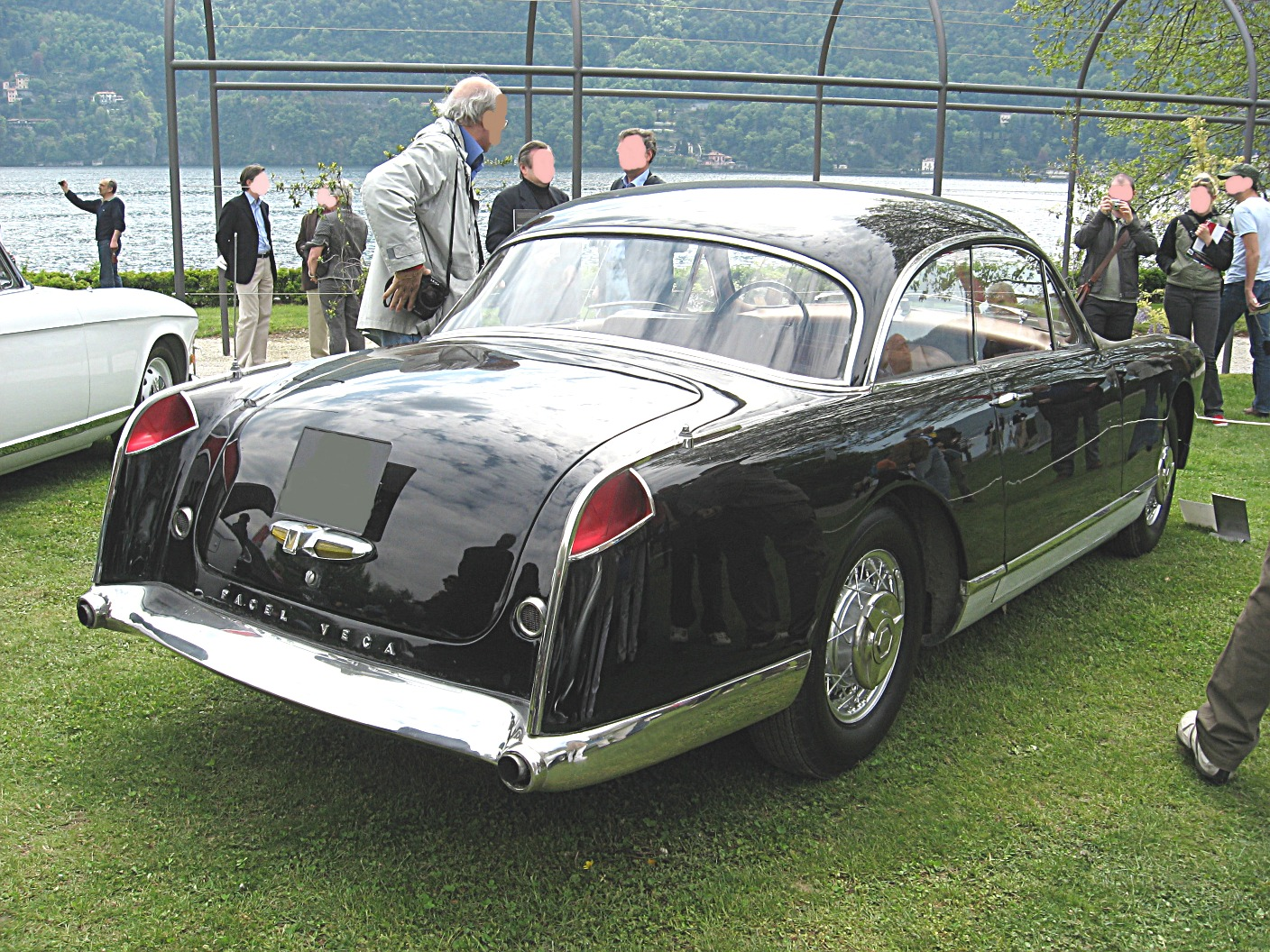 Facel Vega FV (1955) at the Concorso d’Eleganza ”Villa d’Este” 2008, Cernobbio (CO), Italy